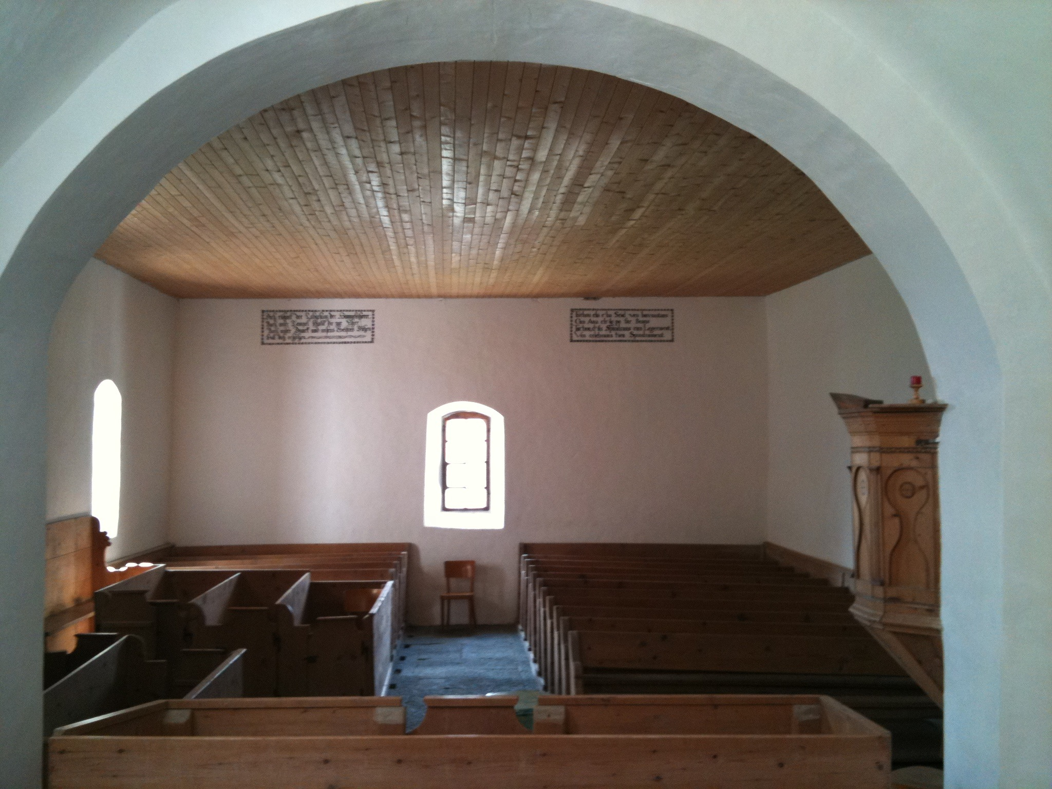 reformierte Kirche Reischen (Kanton Graubünden), Blick aus dem Chor in den Kirchenraum